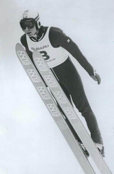 1985 PRESS PHOTO RICK MEWBORN OLYMPICSCANADA - RRQ25307